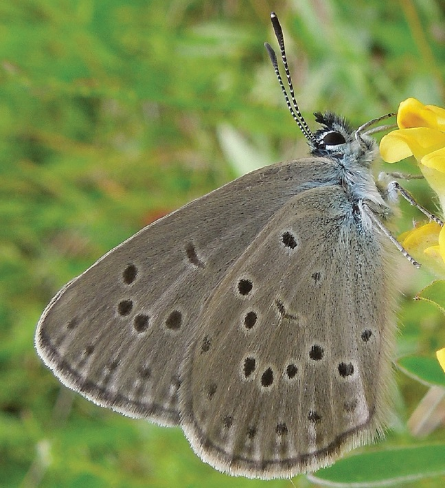 Maculinea alcon